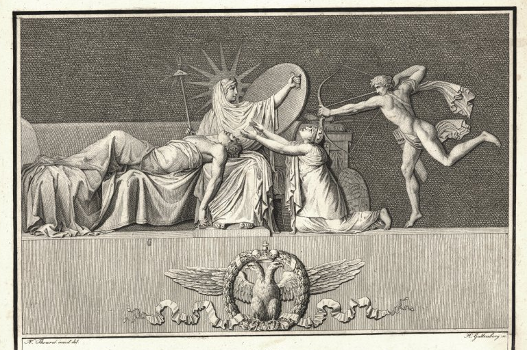 Illustration Thourets zu Carl Lang, Denkmal der Gattenzärtlichkeit...